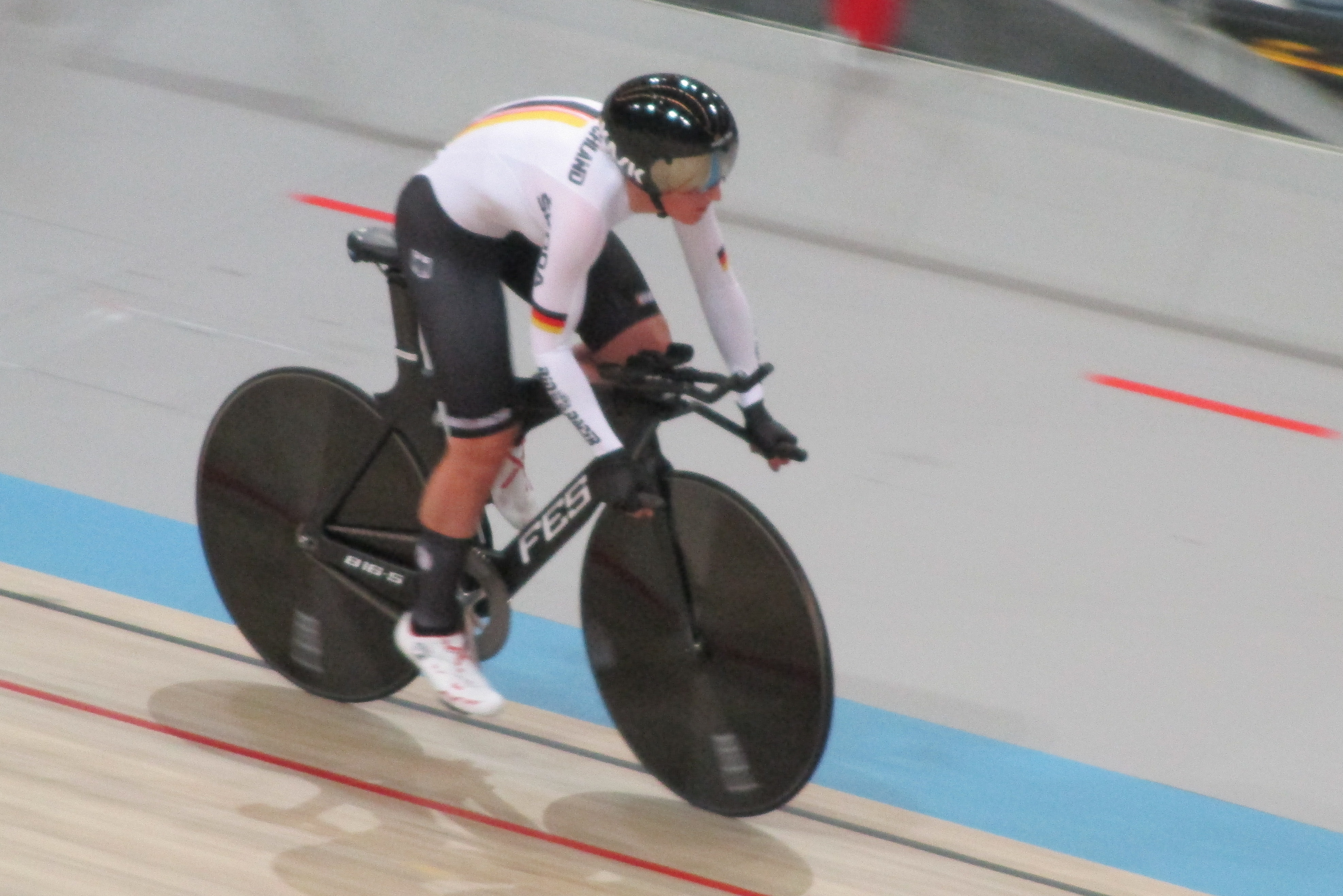 Wereldkampioenschappen baanwielrennen in Omnisport te Apeldoorn van 28 februari t/m 4 maart 2018.